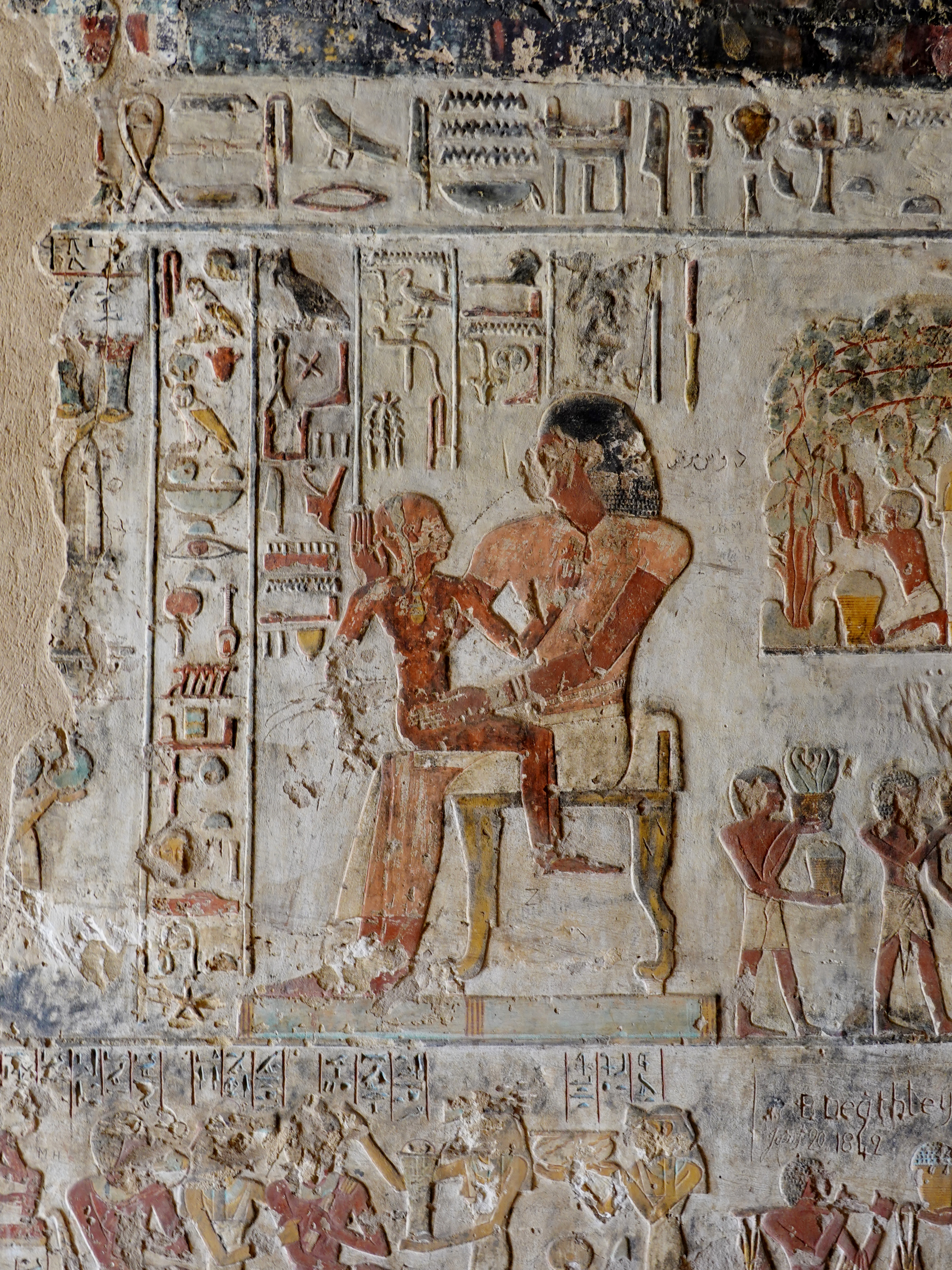 Felsengrab des Paheri unter den Felsengräbern des altägyptischen Necheb bei el-Kab, Ägypten